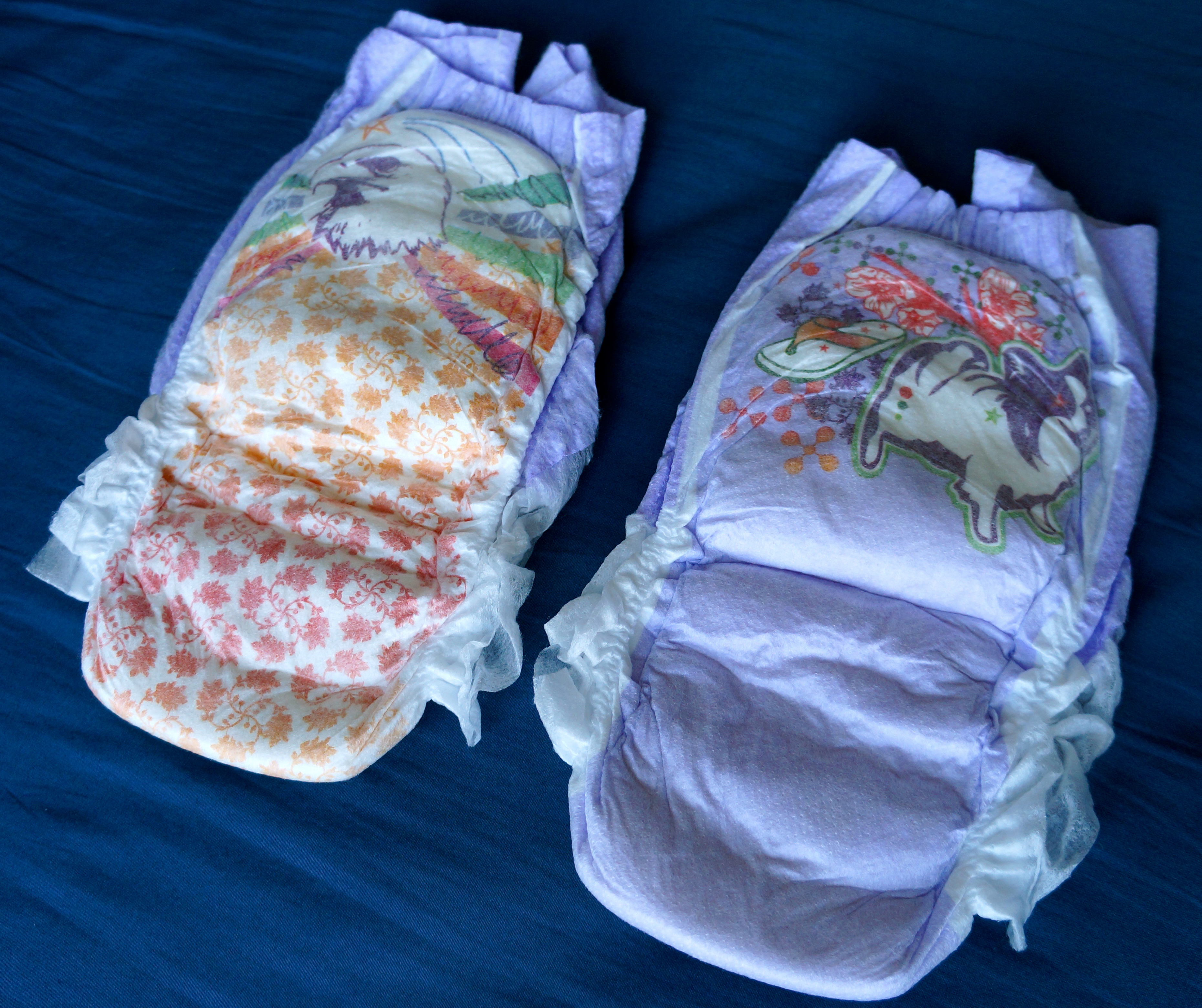 Deux exemplaires de UnderJams pour filles, taille L/XL